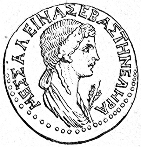 Messalina